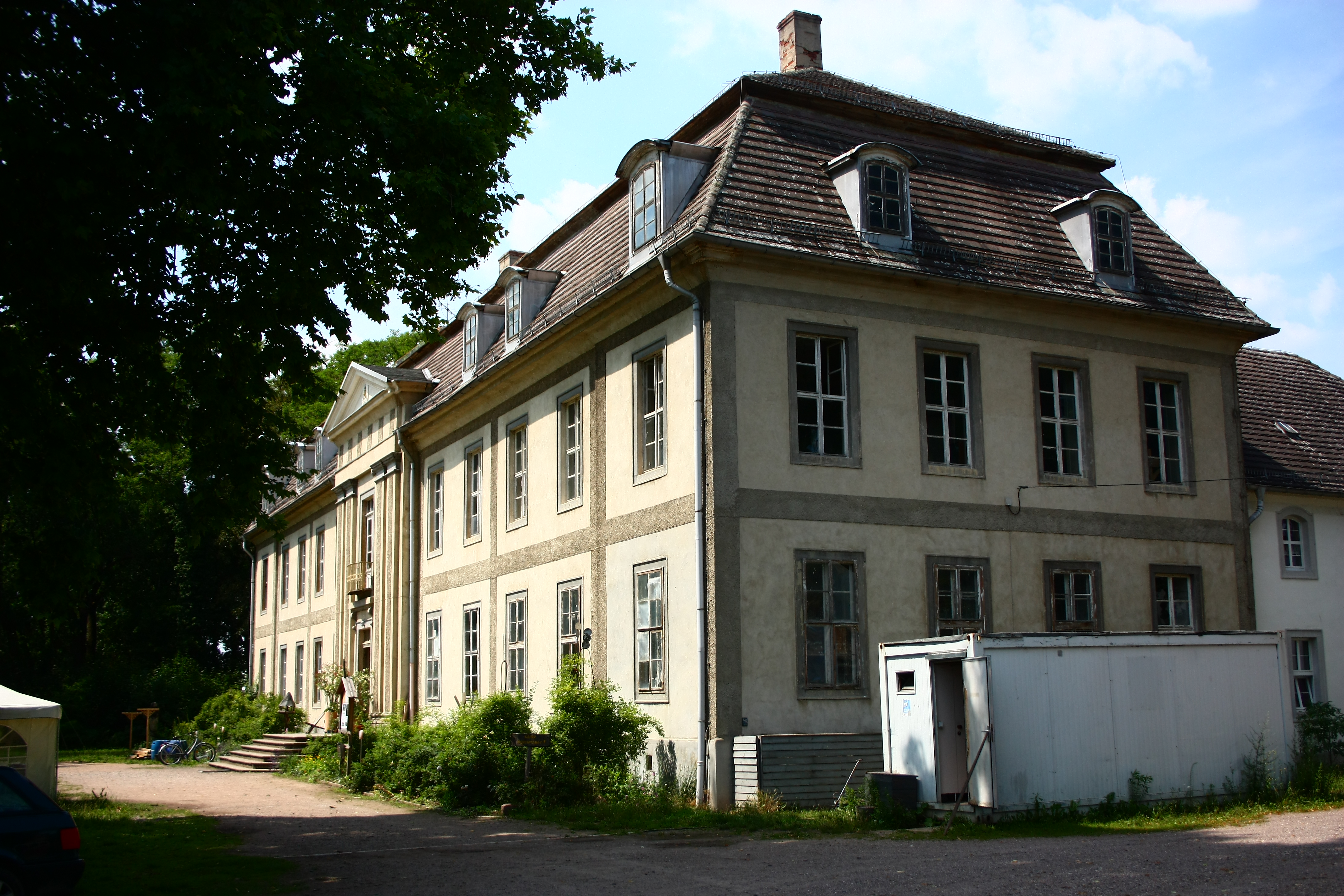 das Schloss von Quetzdölsdorf bei Zörbig